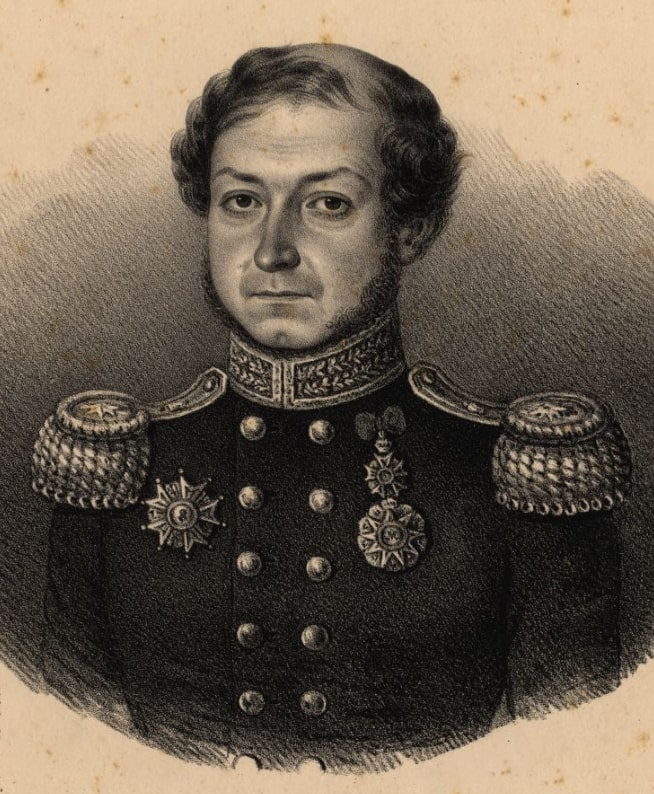 Picture of former Portuguese Prime Minister Rodrigo Pinto Pizarro de Almeida Carvalhais, Baron of Ribeira de Sabrosa.